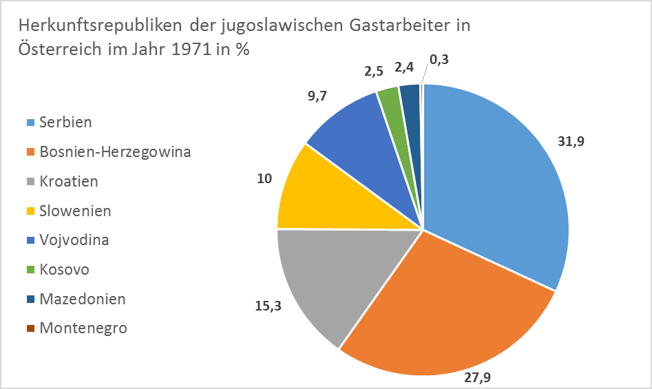 Aufschlüsselung der Herkunftsgebiete von jugoslawischen Gastarbeitern in Österreich im Jahr 1971